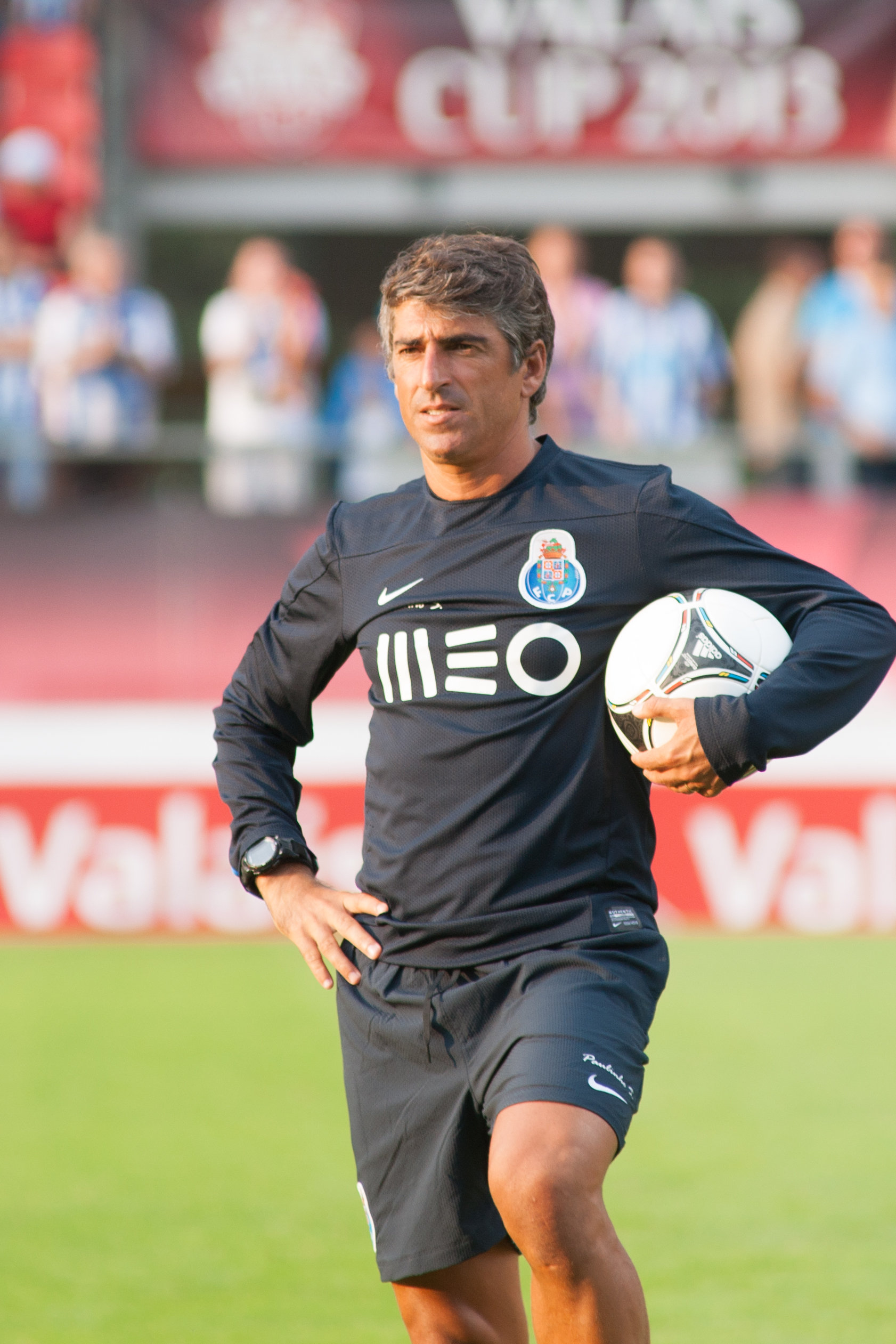 OM - FC Porto - Valais Cup 2013 - Entraineur portugais 1